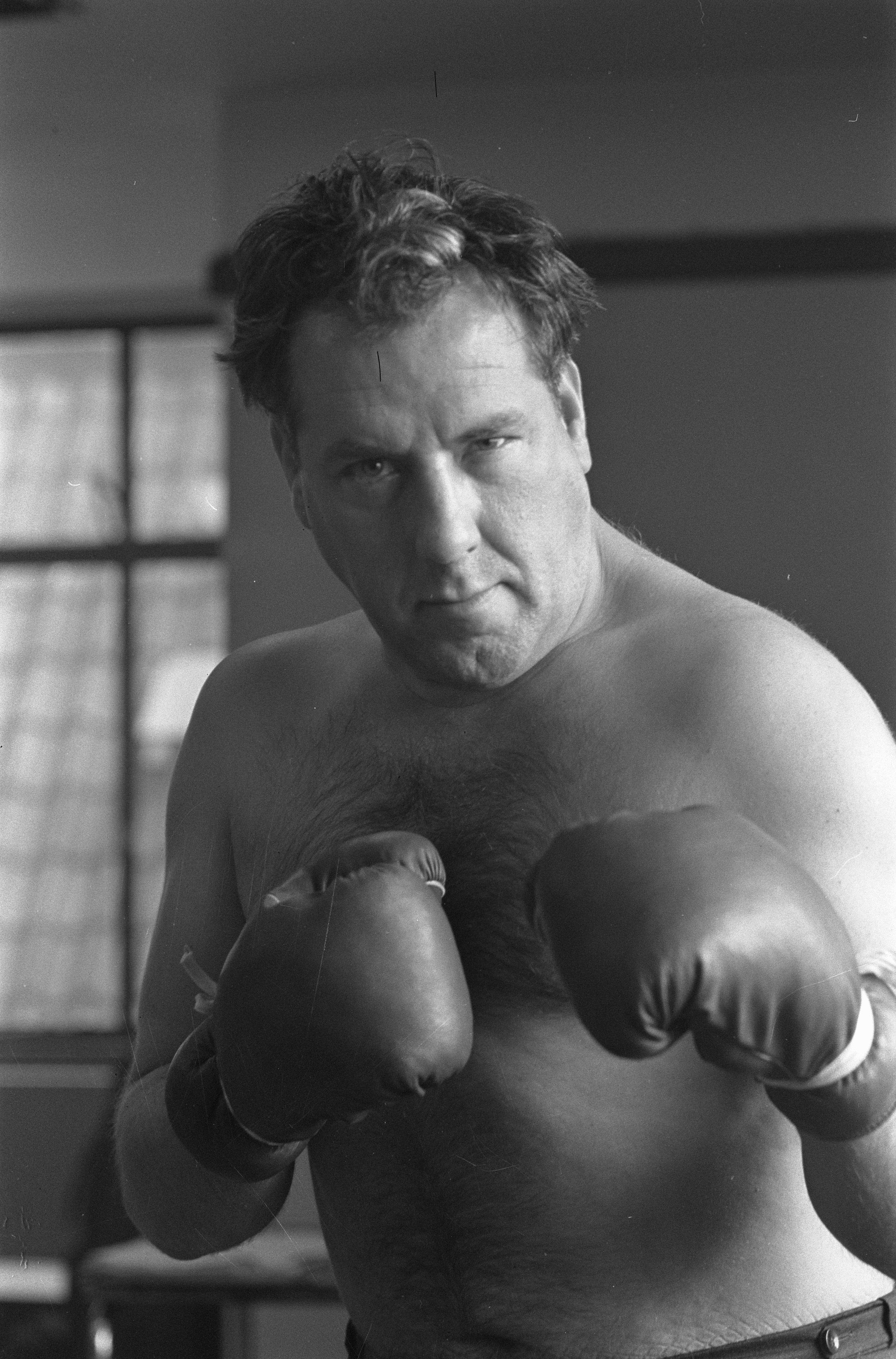 Collectie / Archief : Fotocollectie Anefo Reportage / Serie : [ onbekend ] Beschrijving : Ko van Dijk traint voor zijn rol in "Requiem van een zwaargewicht" Ko van Dijk en Harry Bos (l) Datum : 12 november 1959 Trefwoorden : boksen, trainingen Persoonsnaam : Dijk, Ko van, Harry Bos Fotograaf : Pot, Harry / Anefo Auteursrechthebbende : Nationaal Archief Materiaalsoort : Negatief (zwart/wit) Nummer archiefinventaris : bekijk toegang 2.24.01.05 Bestanddeelnummer : 910-8159